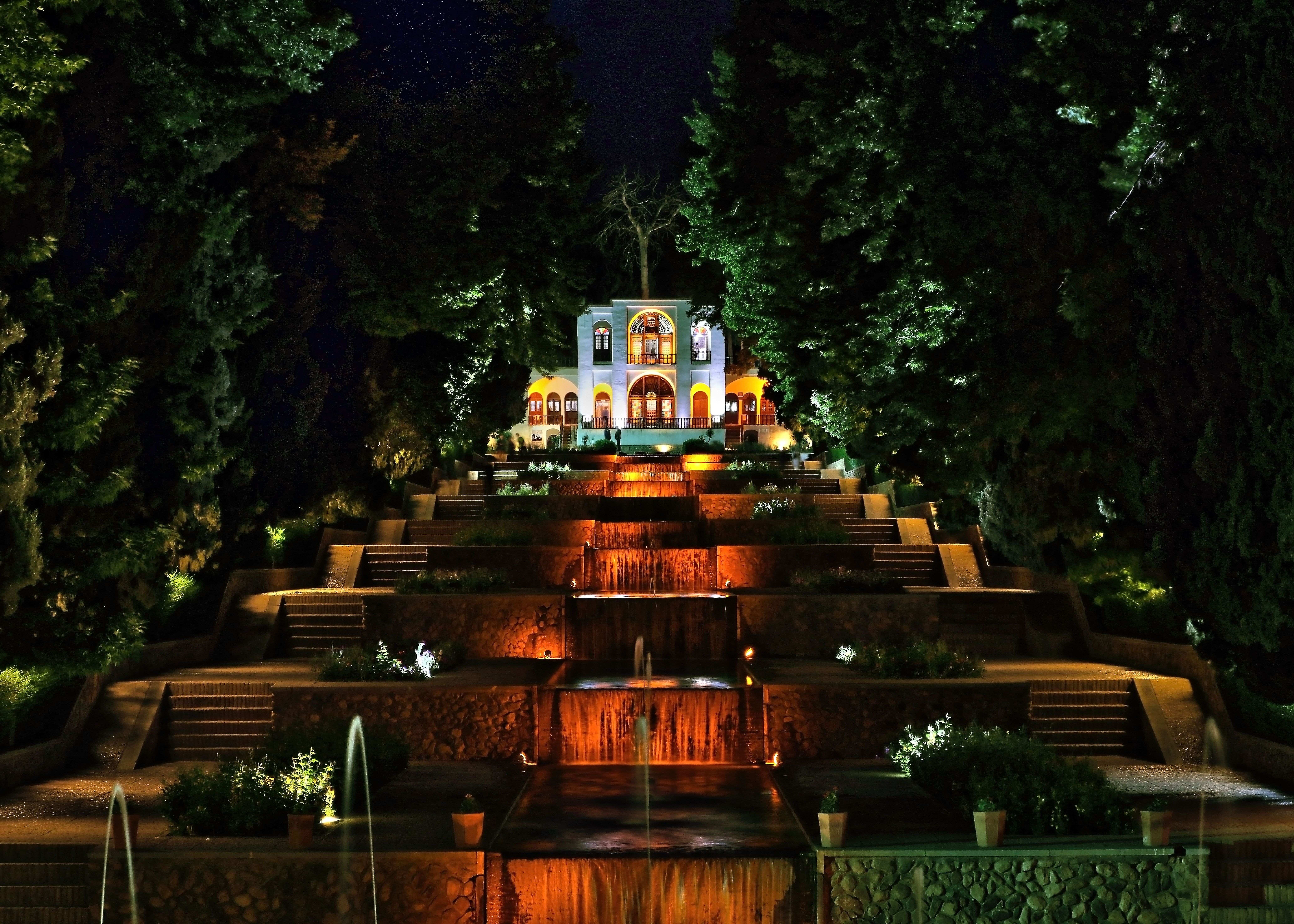 باغ و عمارت شاهزاده ماهان